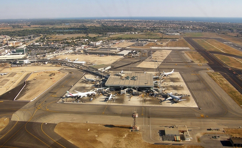 Fiumicino